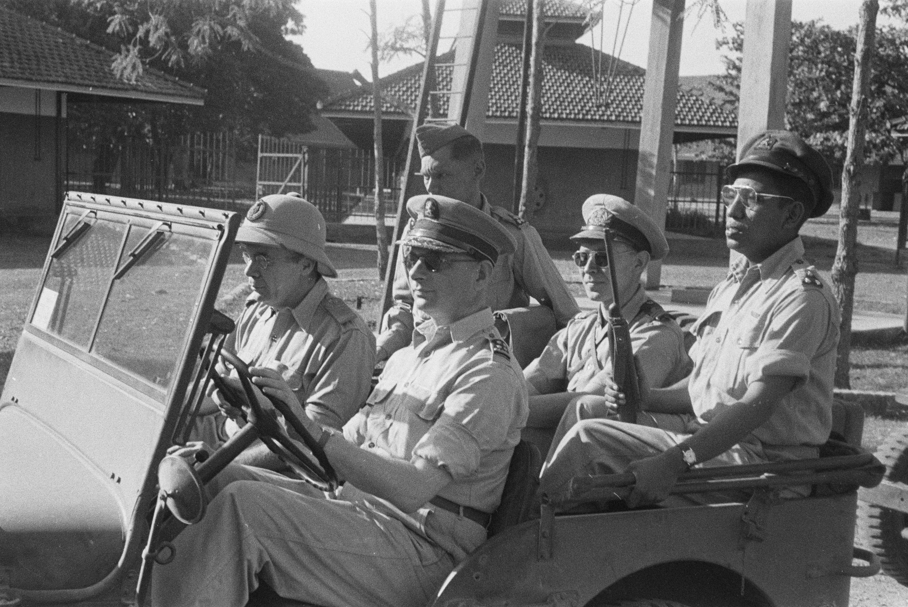 Collectie / Archief : Fotocollectie Dienst voor Legercontacten Indonesië Reportage / Serie : [DLC] Bezoek van generaal S.H. Spoor en luitenant-gouverneur-generaal H.J. van Mook aan de detachementen ten westen van Batavia Beschrijving : S.H. Spoor achter het stuur van een jeep, links naast hem H.J. van Mook Annotatie : links achter Van Mook zijn adjudant lluitenant-ter-zee 1e klasse W. Langeraar. Rechts kapitein J. Tahija, adjudant van generaal Spoor Datum : 6 juni 1946 Locatie : Indonesië, Nederlands-Indië Fotograaf : Fotograaf Onbekend / DLC Auteursrechthebbende : Nationaal Archief Materiaalsoort : Negatief (zwart/wit) Nummer archiefinventaris : bekijk toegang 2.24.04.03 Bestanddeelnummer : 7-1-4